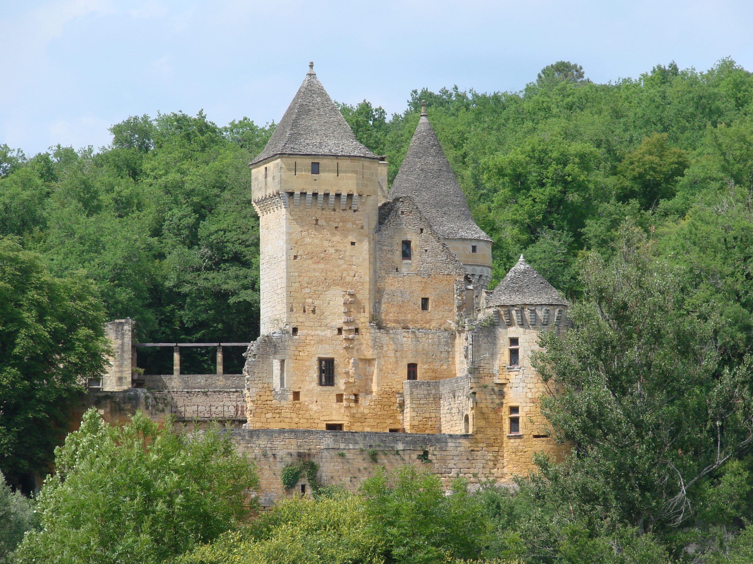 Le château de Laussel vu depuis le château de Commarque, Dordogne.